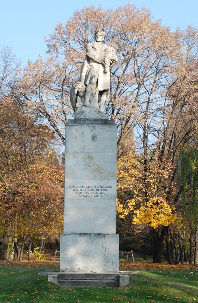 Lengyel légionisták emlékműve a Népligetben (Népliget, Budapest, X. kerület, Magyarország)